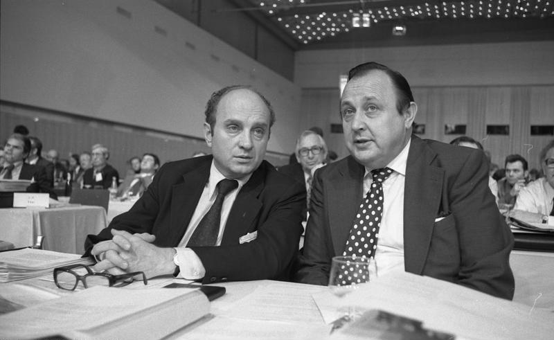 FDP-Bundesparteitag in der Rheingoldhalle in Mainz.